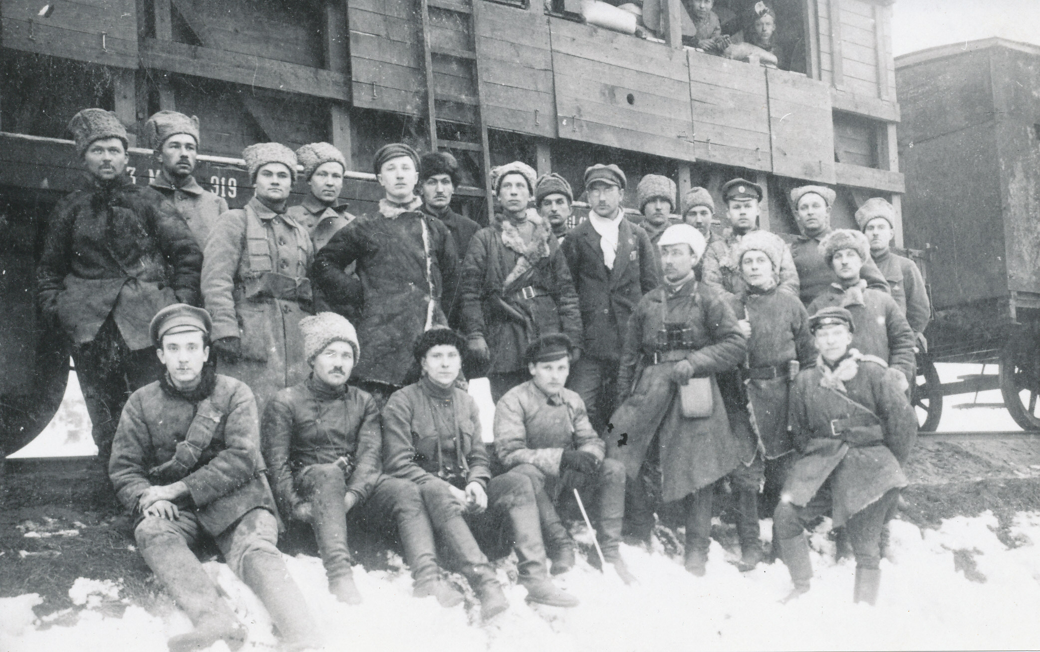 Laiarööpmelise soomusrongi nr. 1 ohvitserid (detsember 1918)